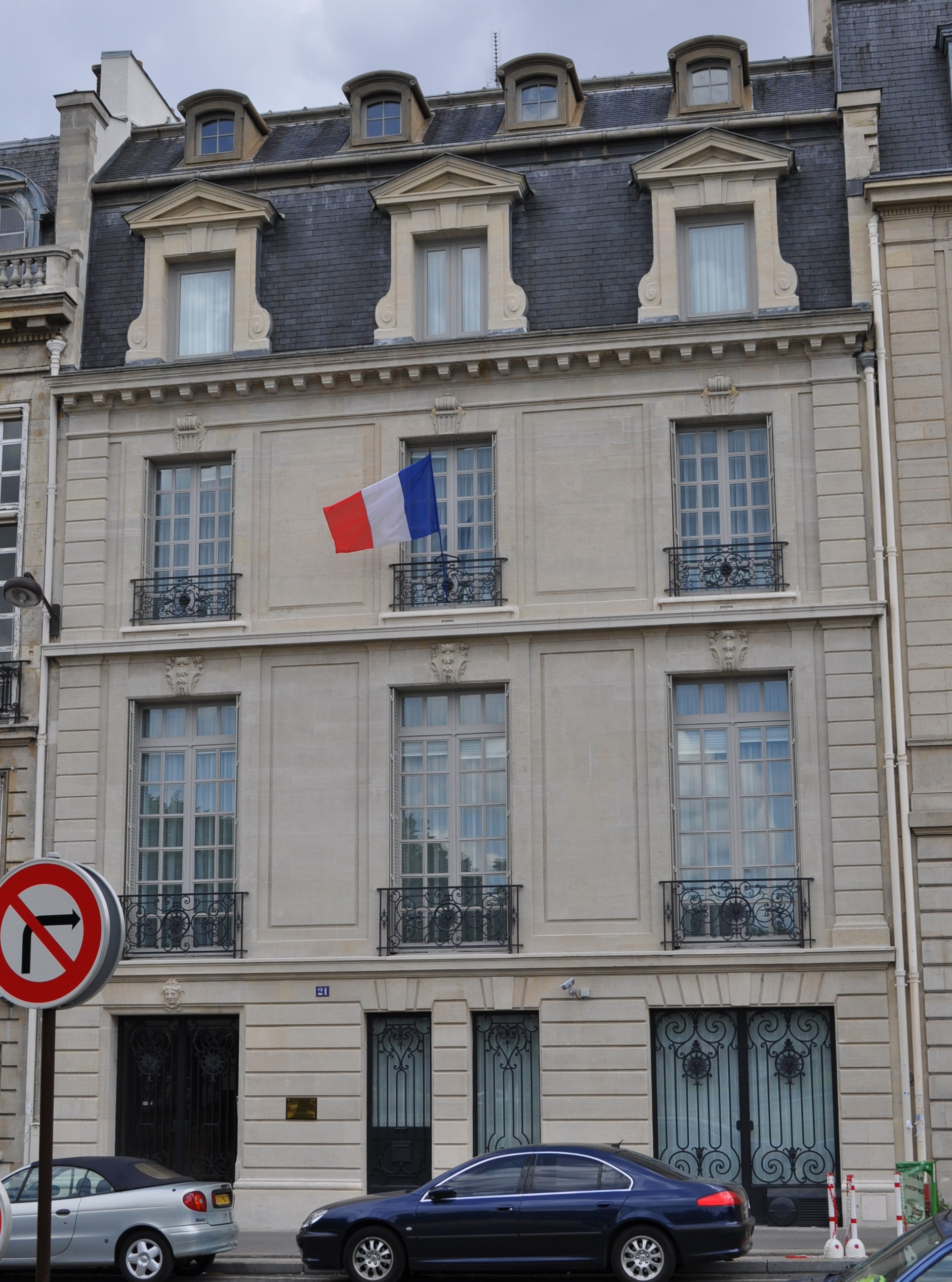 Bâtiment de la Cour de Justice de la République à Paris (France), 21 rue de Constantine.